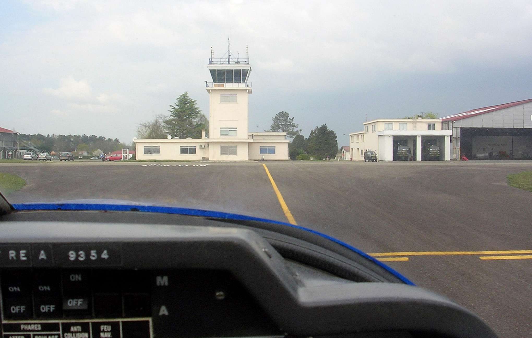 Aérodrome de Dax, dans les Landes (France).